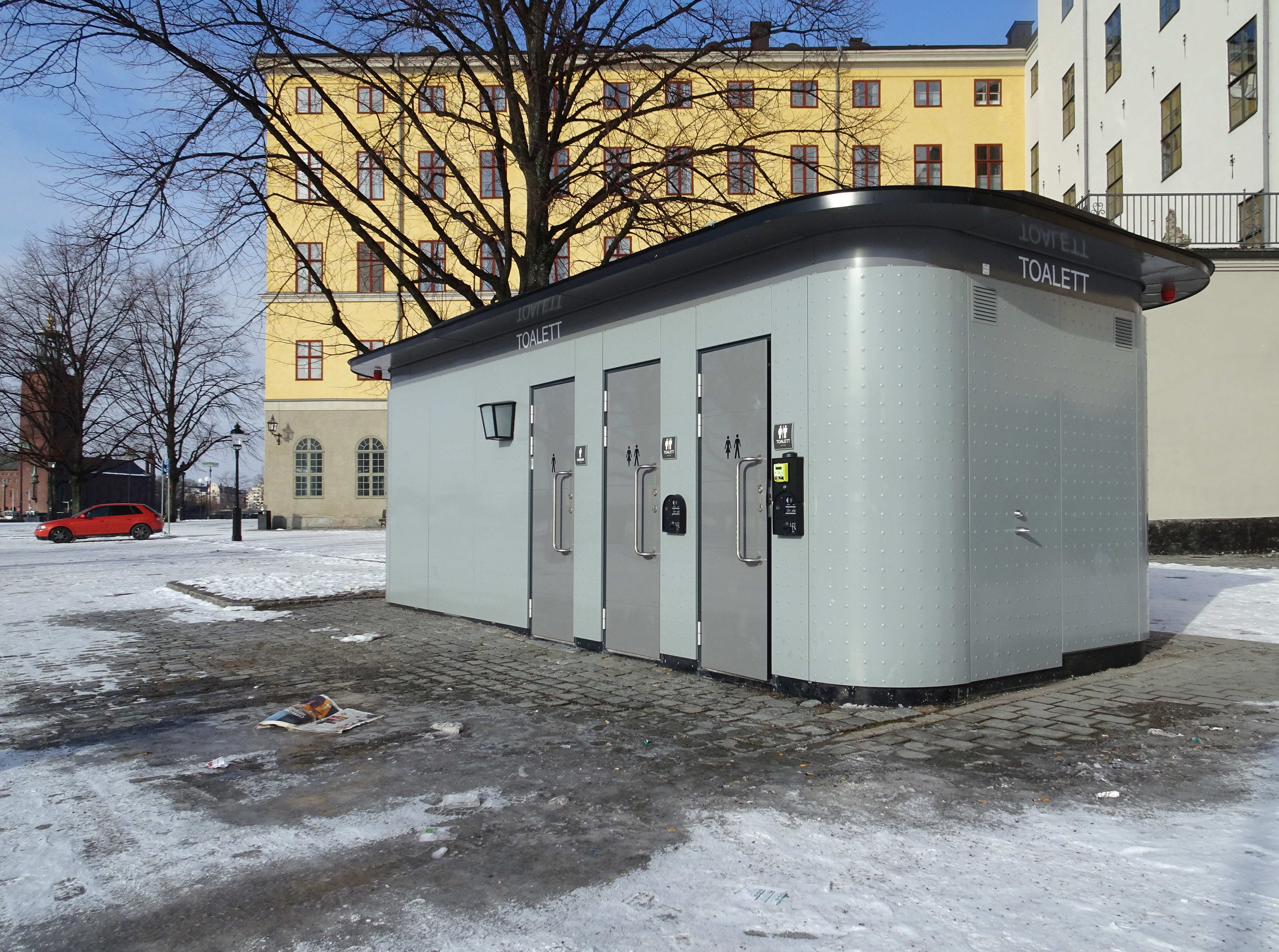 Ny offentlig toalett på Riddarholmen